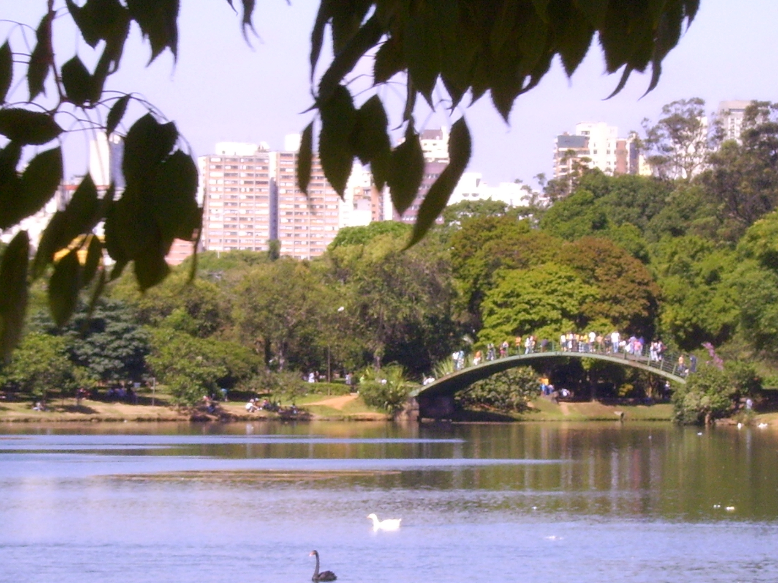 lake in the Parque do Ibirapuera in Sao Paulo, Brazil